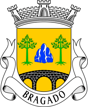 Brasão da freguesia de Bragado (concelho de Vila Pouca de Aguiar)